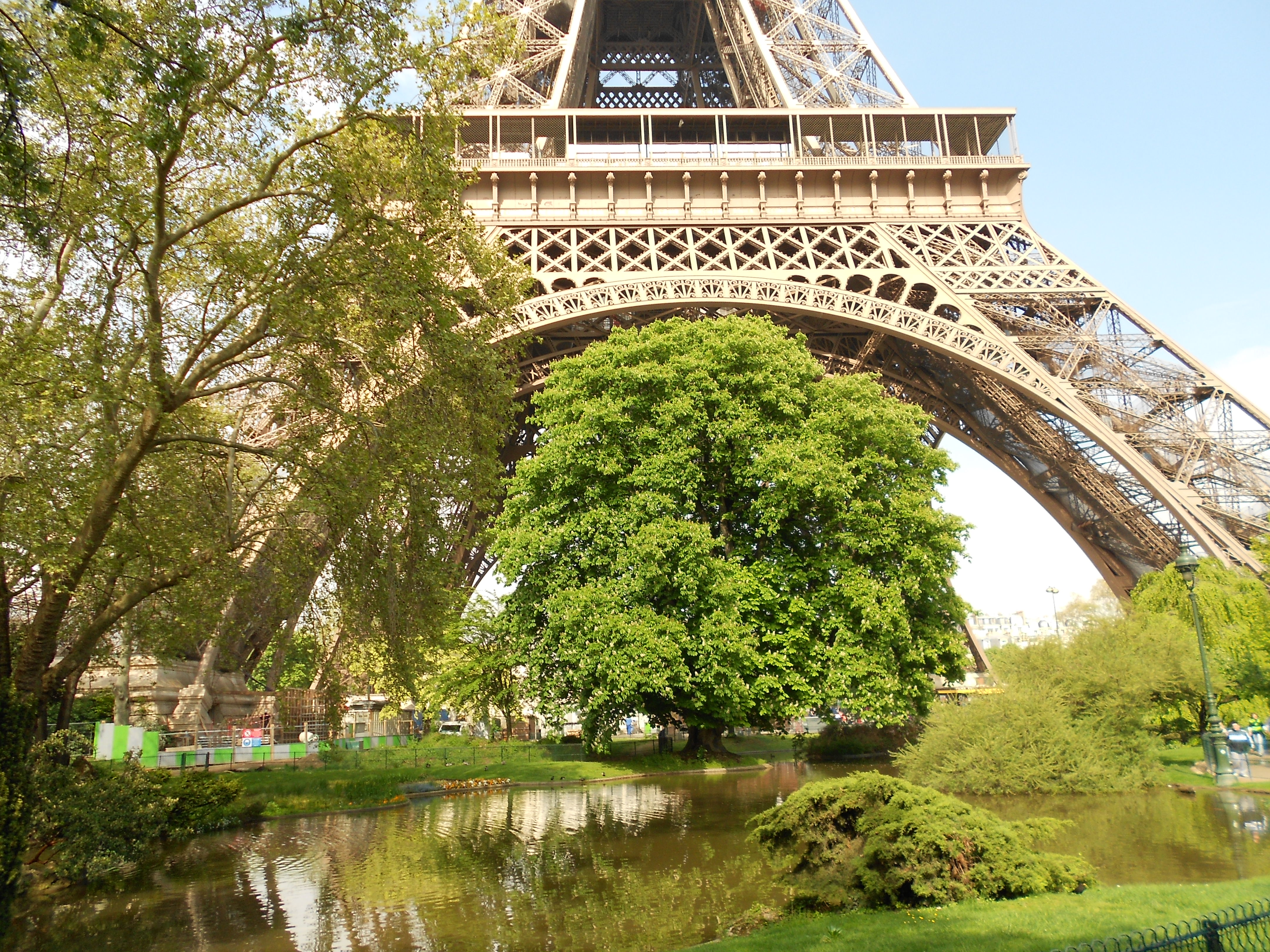 Teich und blühende Kastanie auf dem Champ-de-Mars, Paris